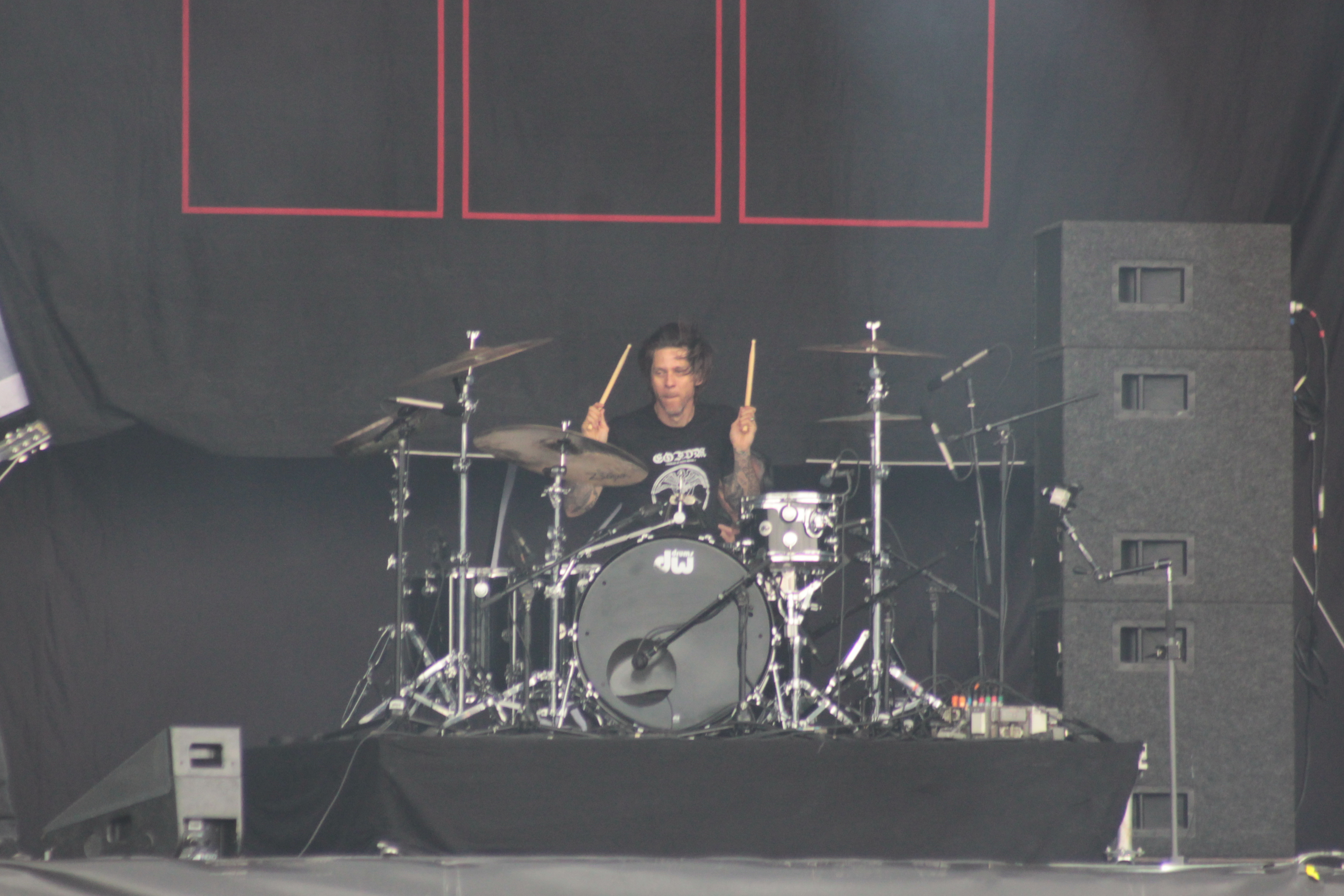 Atom Willard, Danko Jones, Helfest 2013, Fr-44-Clisson.